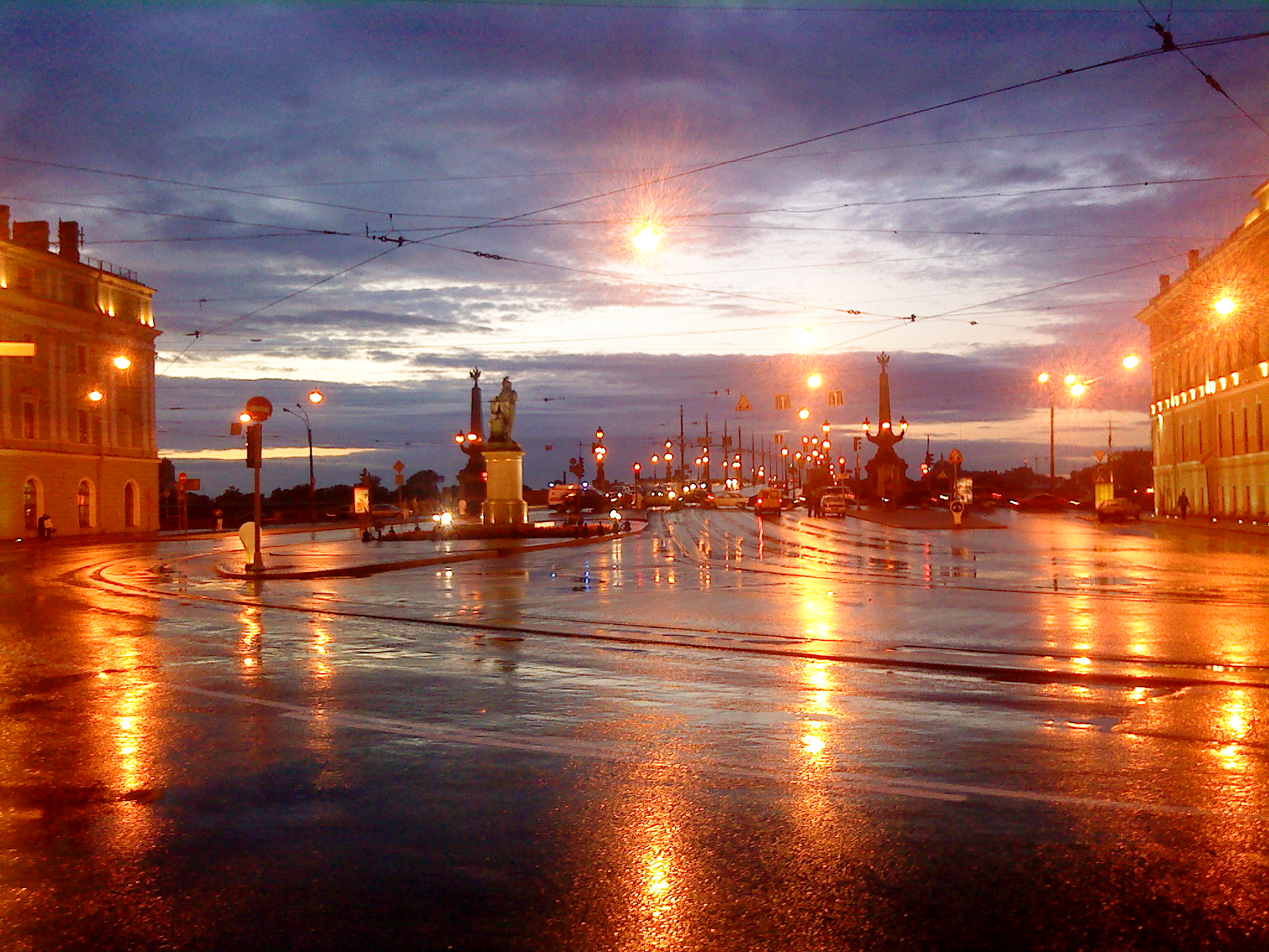 Ночи-дни, берега-улицы и фонари.